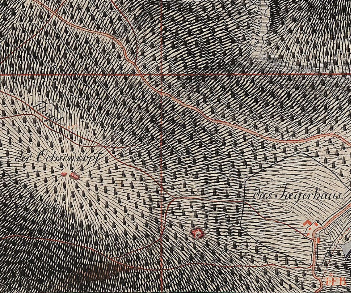 Westerzgebirge - Friedrich Ludwig Aster: Meilenblätter von Sachsen, Ausschnitt aus Blatt 222 des Berliner Exemplars – Bockau, Sosa, Blauenthal, Albernau -, aus dem Jahr 1791. Link zur Landkarte in der Staats- und Universitätsbibliothek DresdenIn dieser Landkarte ist Nordwesten oben. Jägerhaus (Schwarzenberg) und der Ochsenkopf bei Jägerhaus. Beim Jägerhaus entspringt der Bockauer Dorfbach.